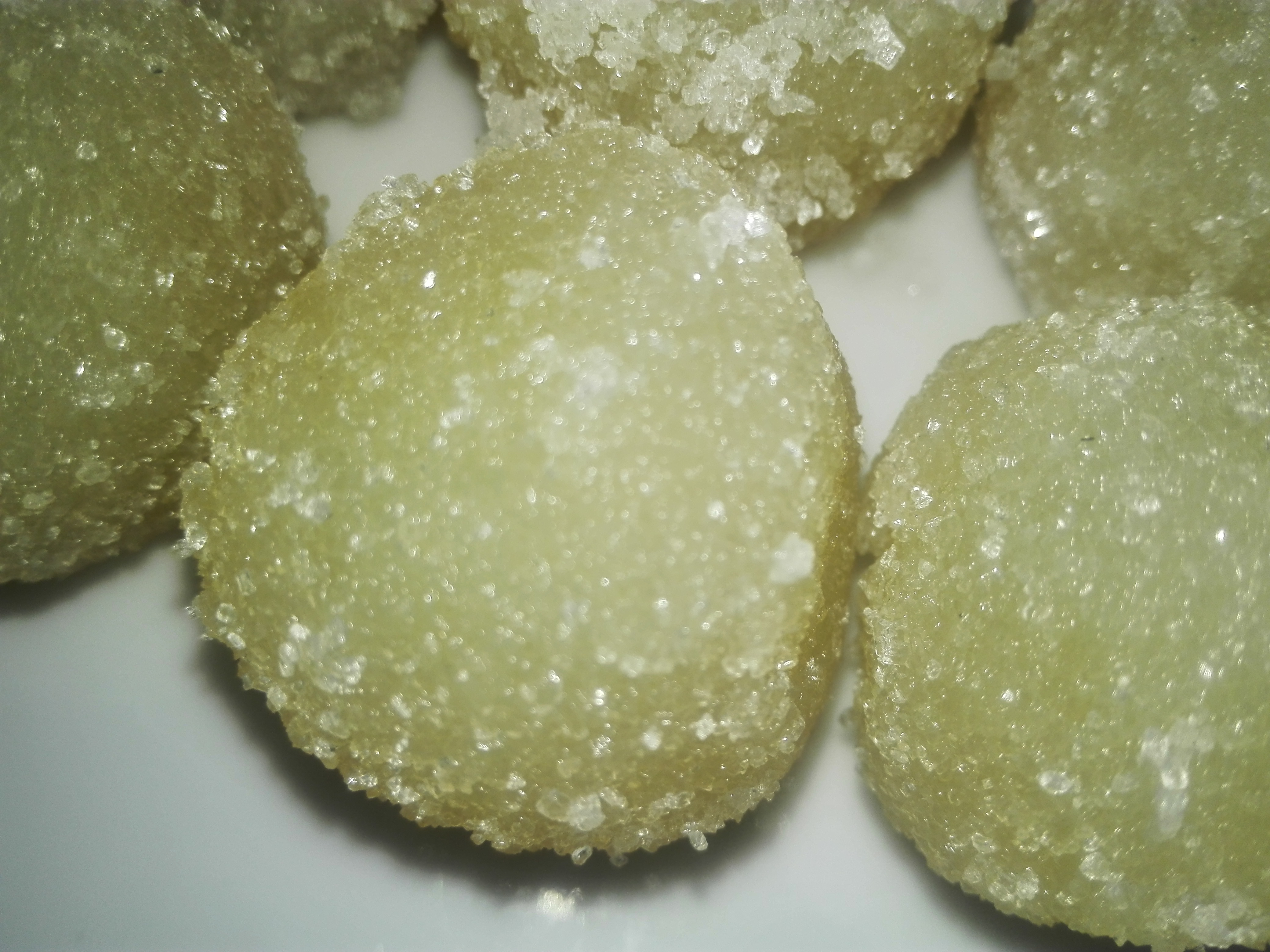 বাংলার মিষ্টি যা বাংলাদেশ এবং ভারতে প্রচলিত।